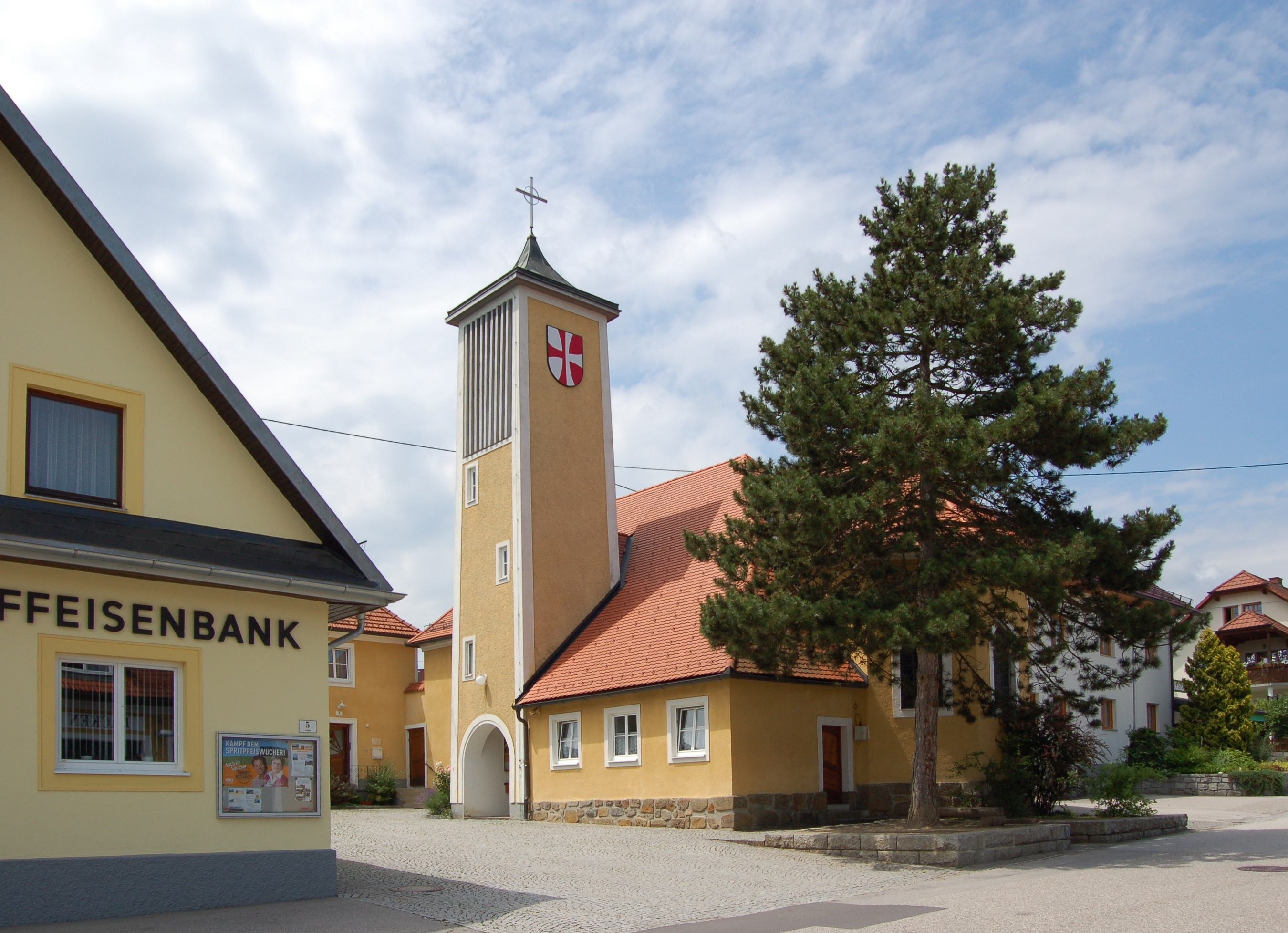 Die Kirche Maria-Hilf wurde zwischen 1930 und 1933 errichtet und zwischen 1952 und 1953 erweitert. Der Glockenturm wurde 1961 angebaut.